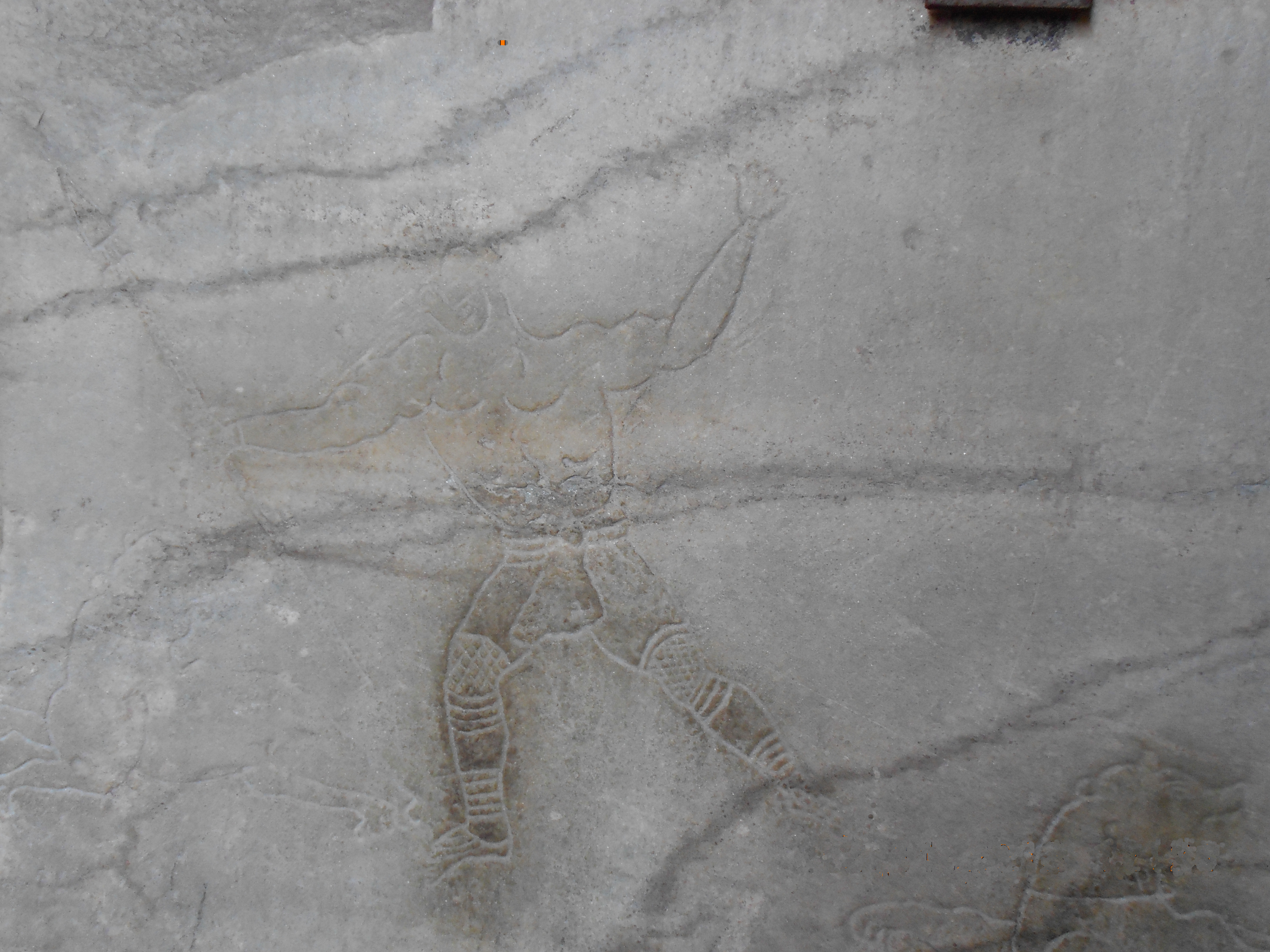 In Stein festgehaltene Tierkampfszene aus dem Colosseum in Rom.